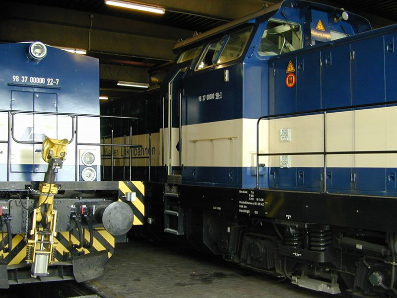 Goederenlokomotieven van de WLB.